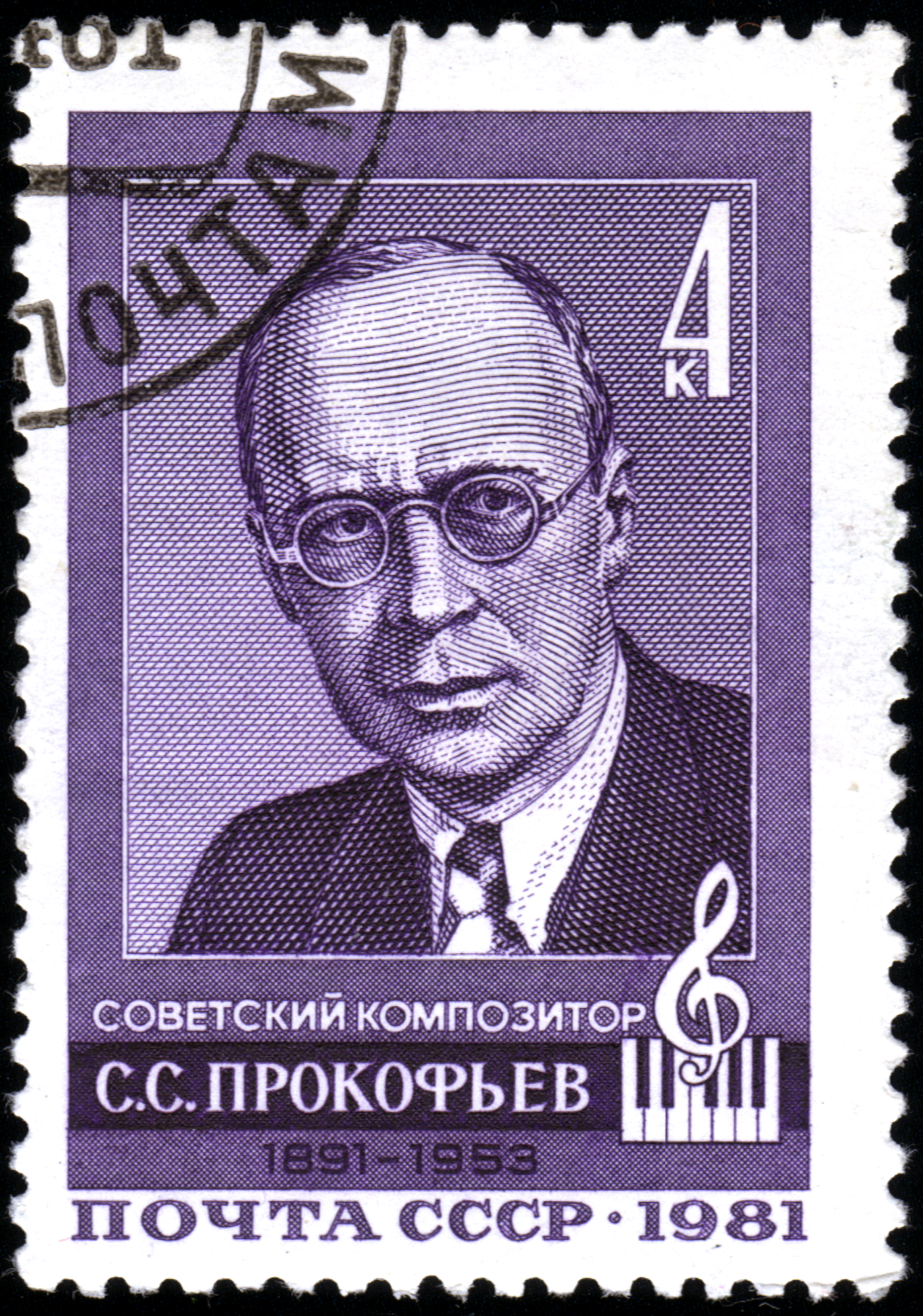 Марка Почты России 1981 года с изображением композитора Сергея Прокофьева.